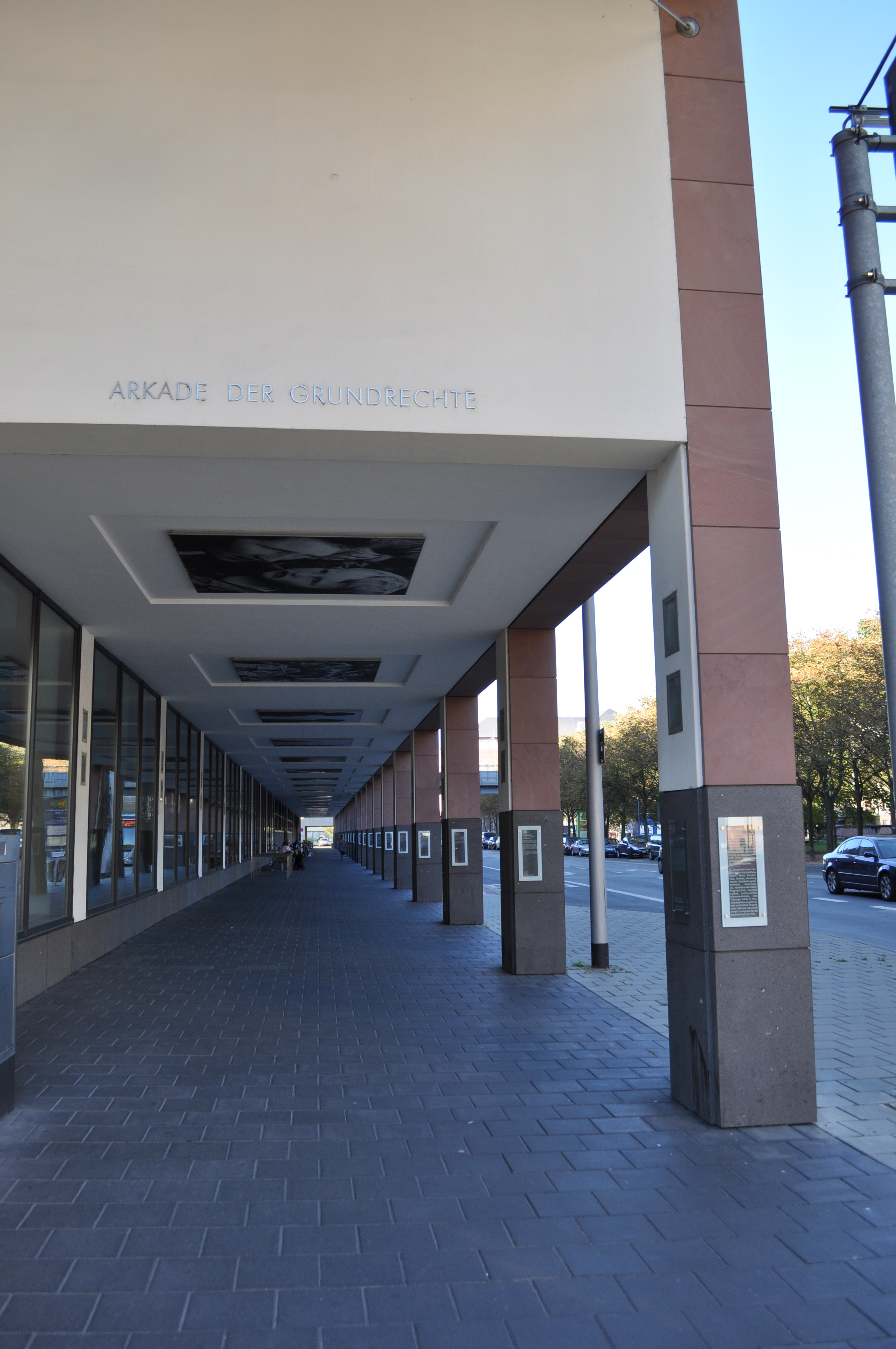 Gebäude des Landgerichtes Darmstadt, Arkade der Grundrechte